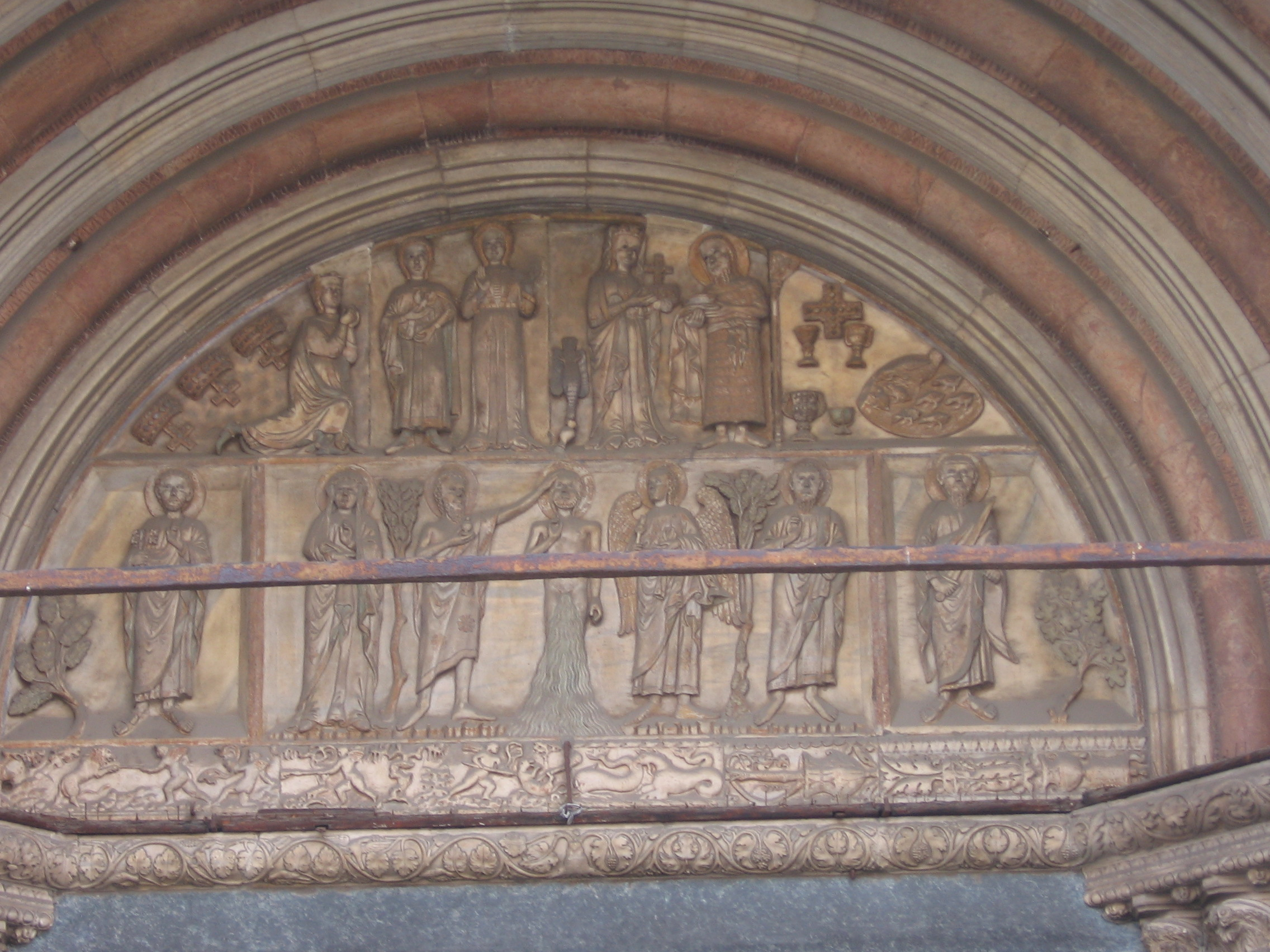 Lunetta sopra il portale del Duomo, Monza